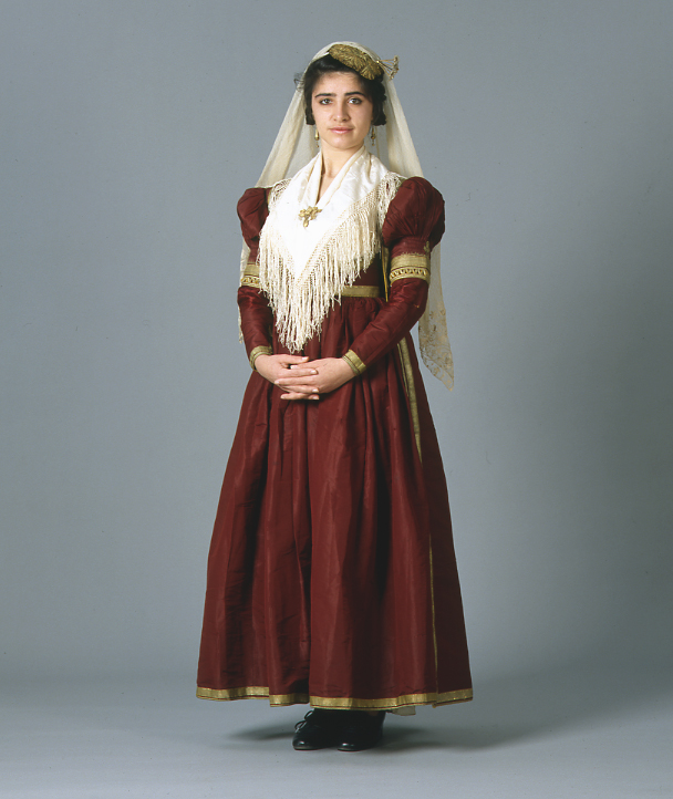 Νυφική ή γιορτινή φορεσιά από τη Λευκάδα. Συλλογή Πελοποννησιακού Λαογραφικού Ιδρύματος, Ναύπλιο